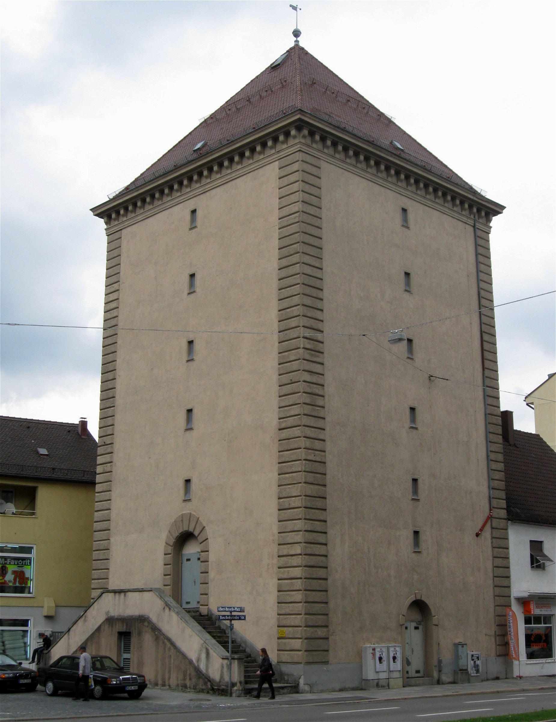 München; Boschetsrieder Straße 68; Hochbunker, siebengeschossiger Turm über quadratischem Grundriss mit Zeltdach über Konsolgesims, Eckrustizierung und Freitreppe an der Westseite, 1941 nach Plänen von Karl Meitinger als Luftschutzturm Nr. 36 errichtet; an der Ostseite des Albert-Bayerle-Platzes